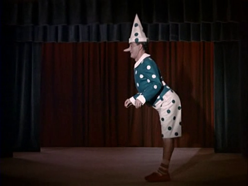 Screenshot del film Totò a colori (1952) diretto da Steno